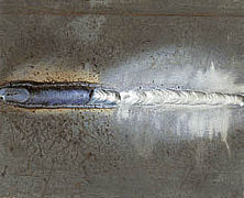 Elektroden-Schweißnaht vor und nach der Bearbeitung mit Schlackenhammer und Drahtbürste (von links)